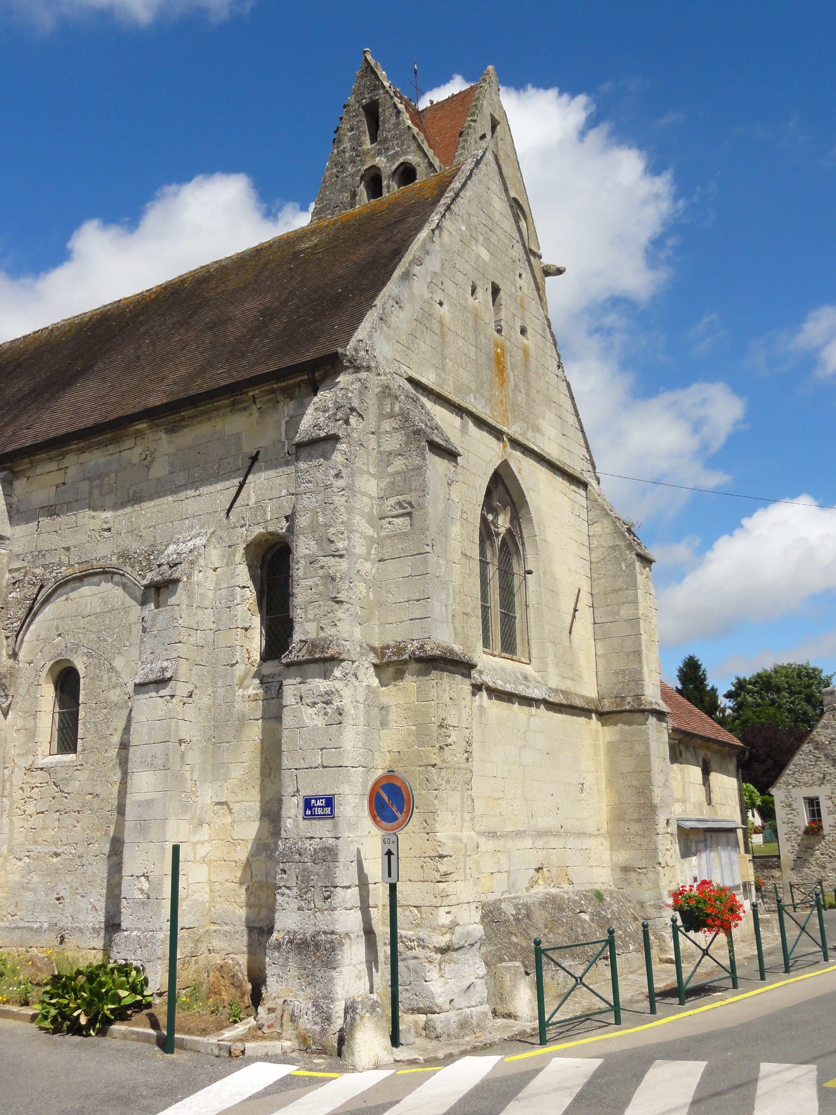 Église Saint-Léger d'Éméville (voir titre).